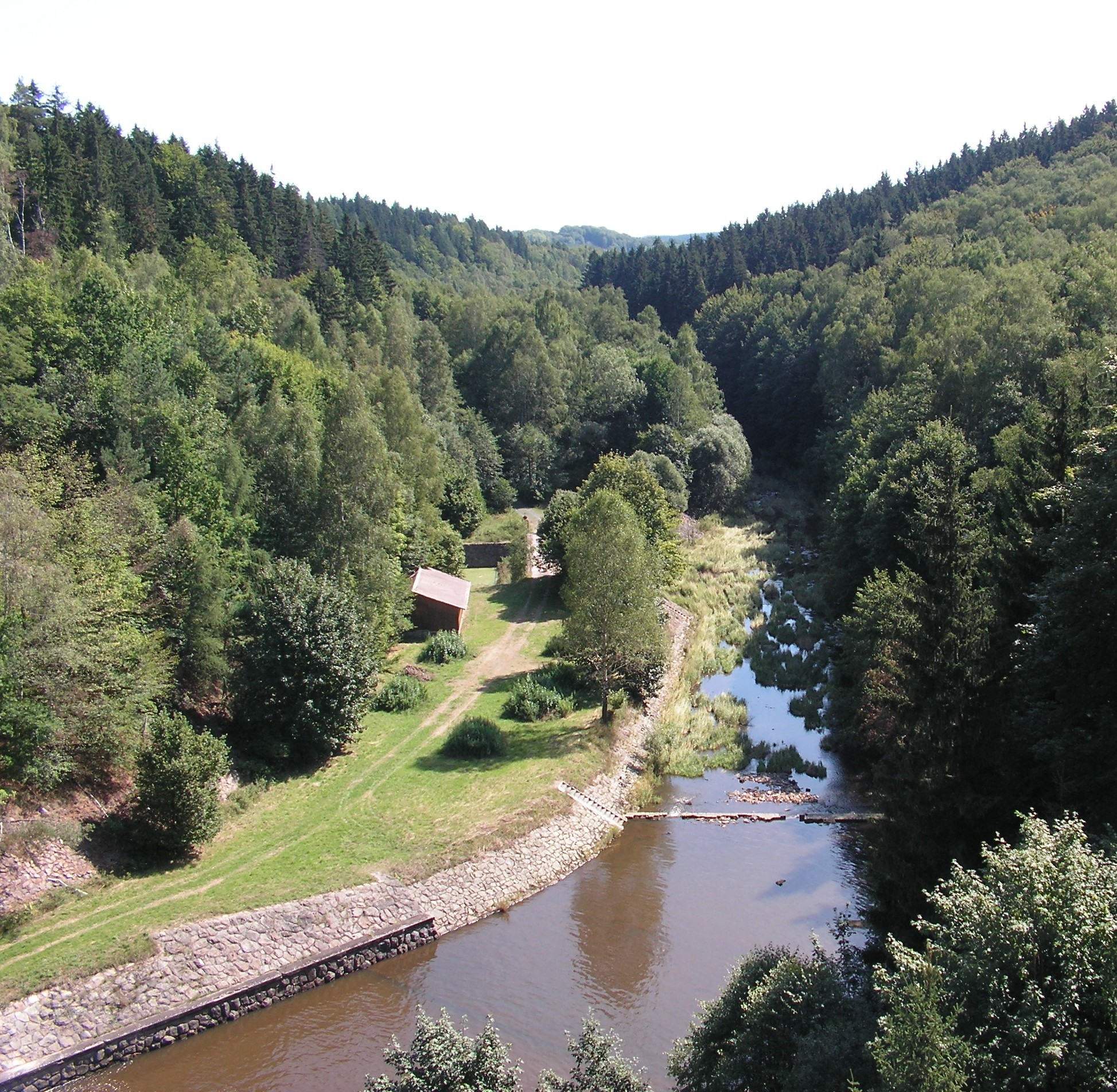 Vodní nádrž Seč-pohled pod hráz